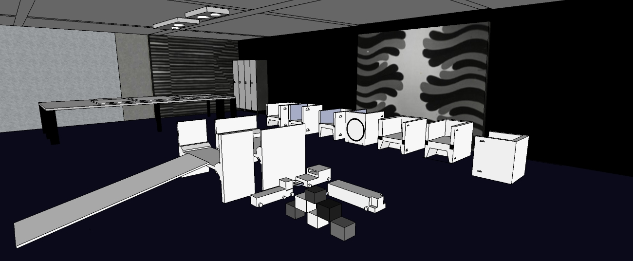 Ricostruzione tridimensionale del progetto di allestimento per il padiglione finlandese dell'arch. Yrjo Kukkapuro. Vista circoscritta alla parte finale dell'allestimento